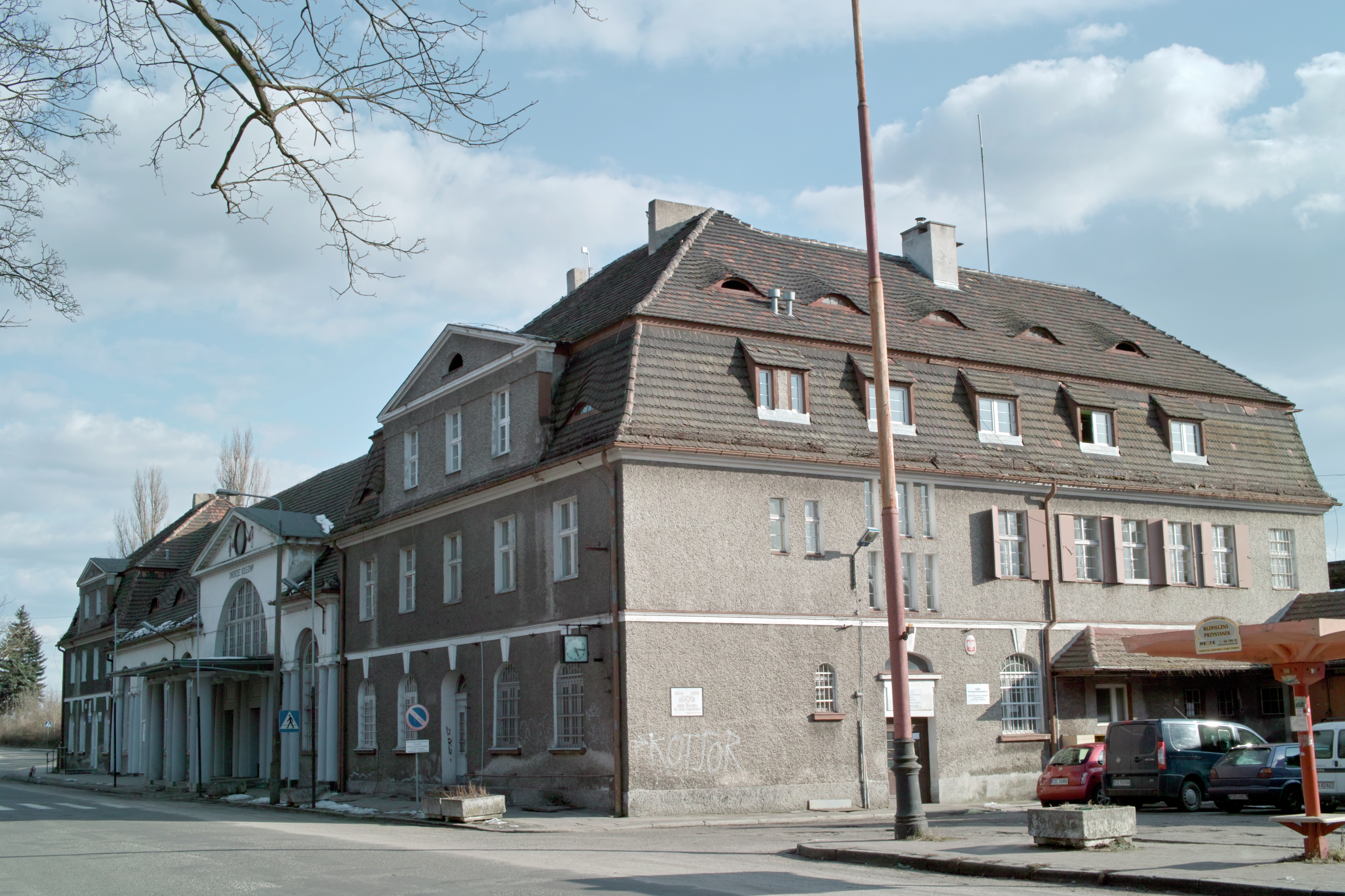 Dworzec kolejowy w Żaganiu, Polska, województwo lubuskie